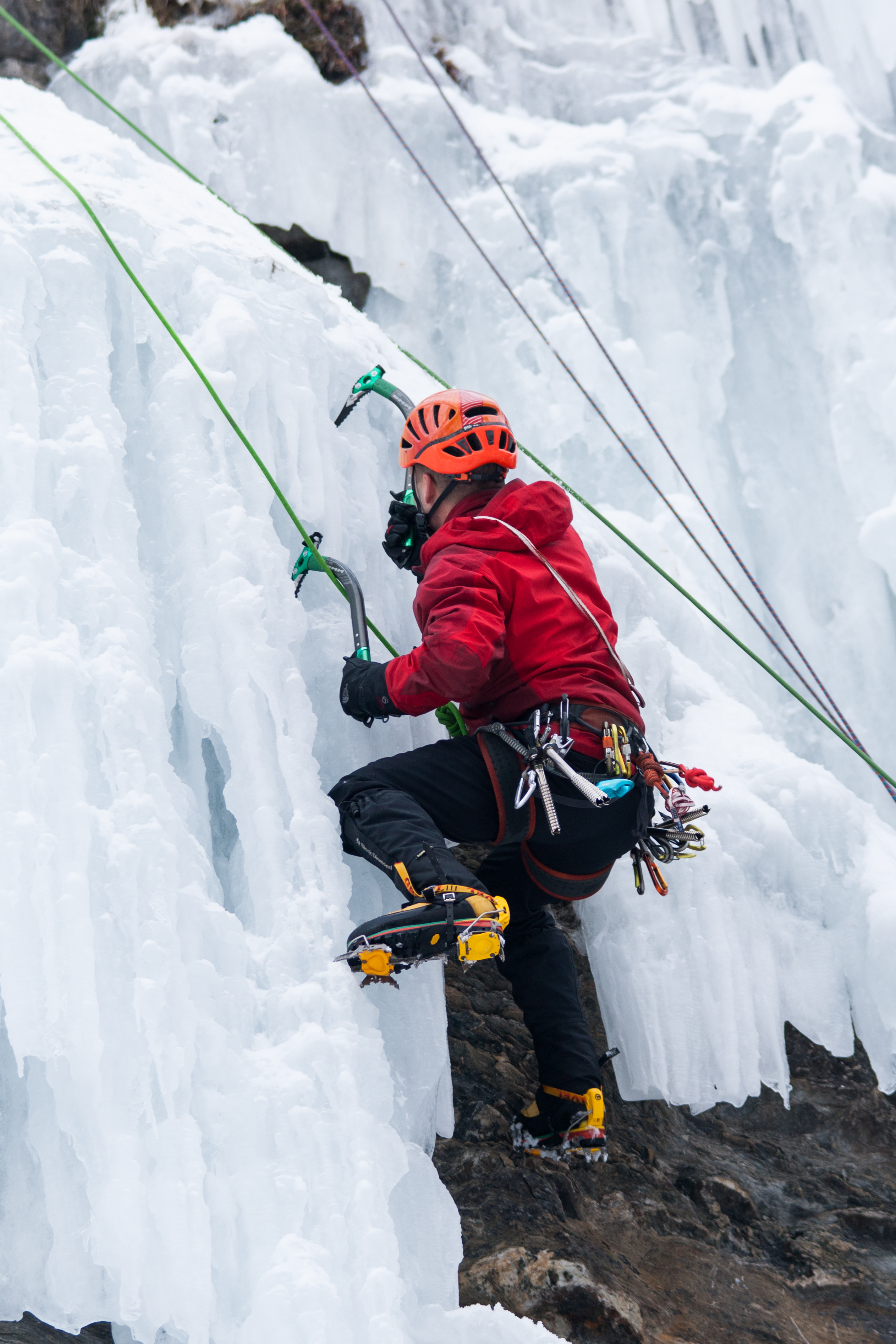 Escalade sur glace à Aiguilles dans les Hautes-Alpes en France